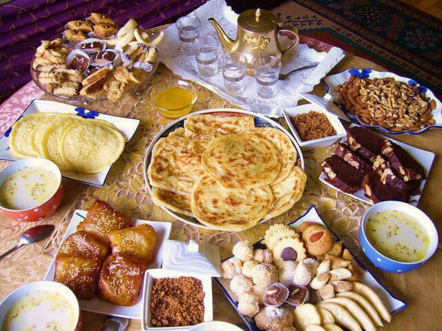 فطور مغربي عصري تقليدي This is an image of food from Morocco